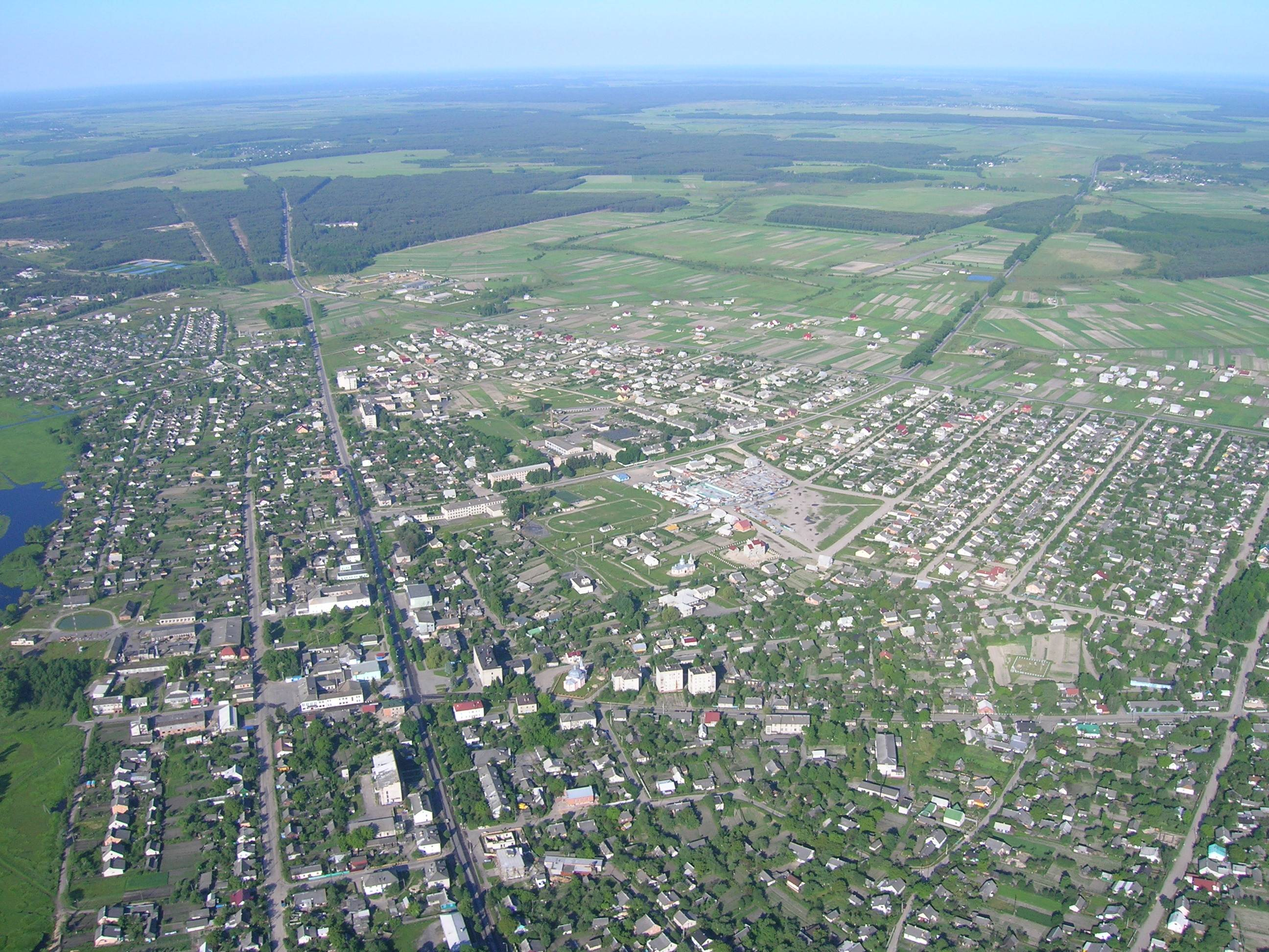 Фото смт. Любешів, зроблене з параплана у 2008 р. у день відкриття стадіону